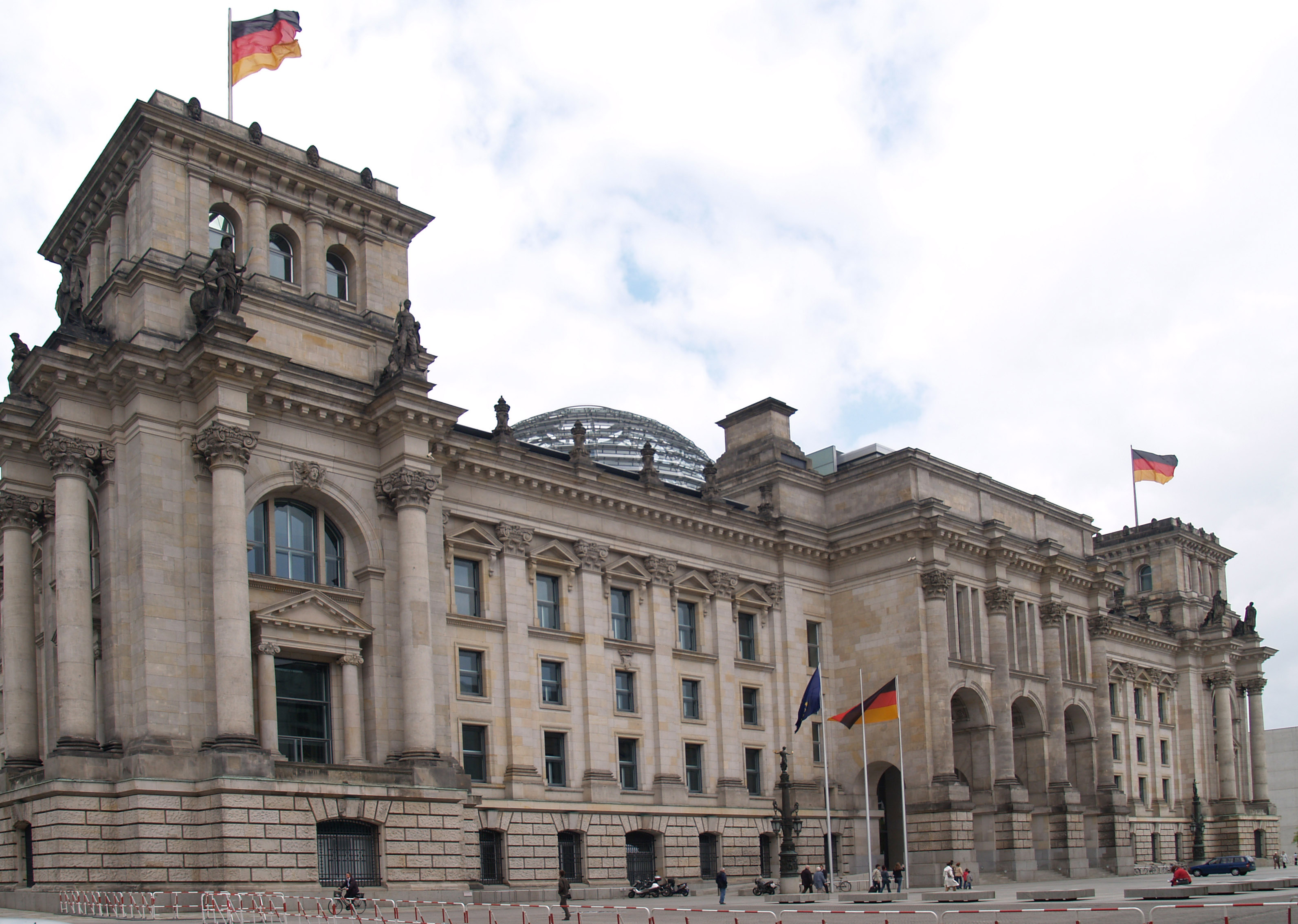 Reichstag at Berlin, east side of de building